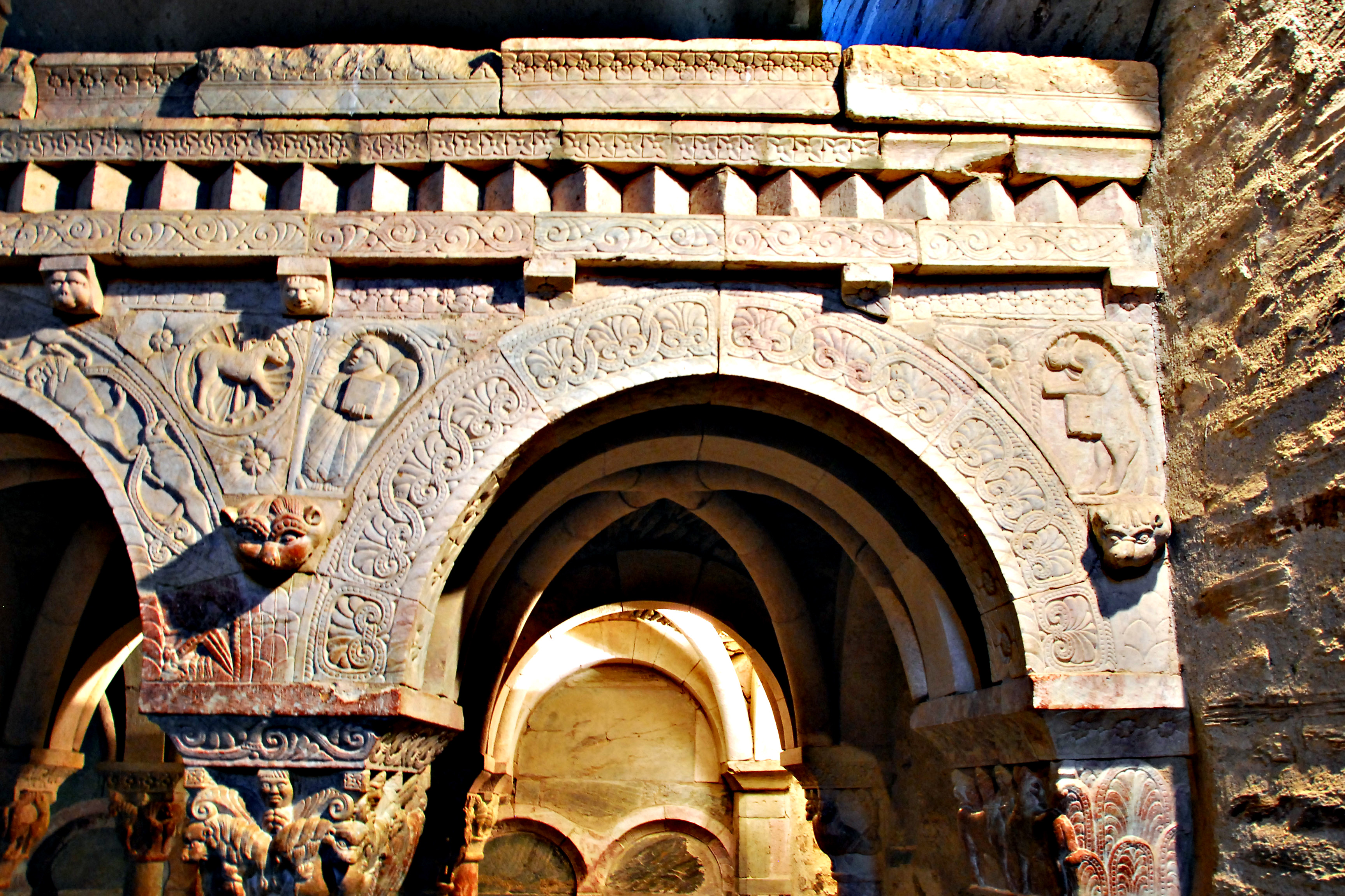 Serrabone, Empore, Westfassade, Südarkade